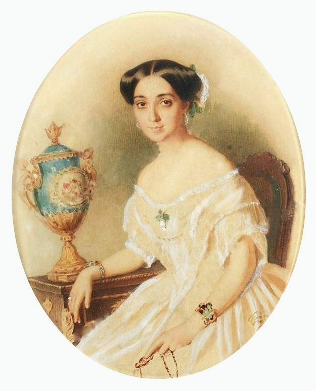 Княгиня Анна Георгиевна Толстая, ур. княжна Грузинская (1798-1889)